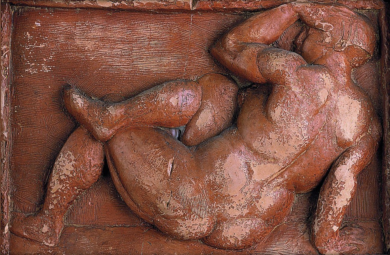 relleu de fang